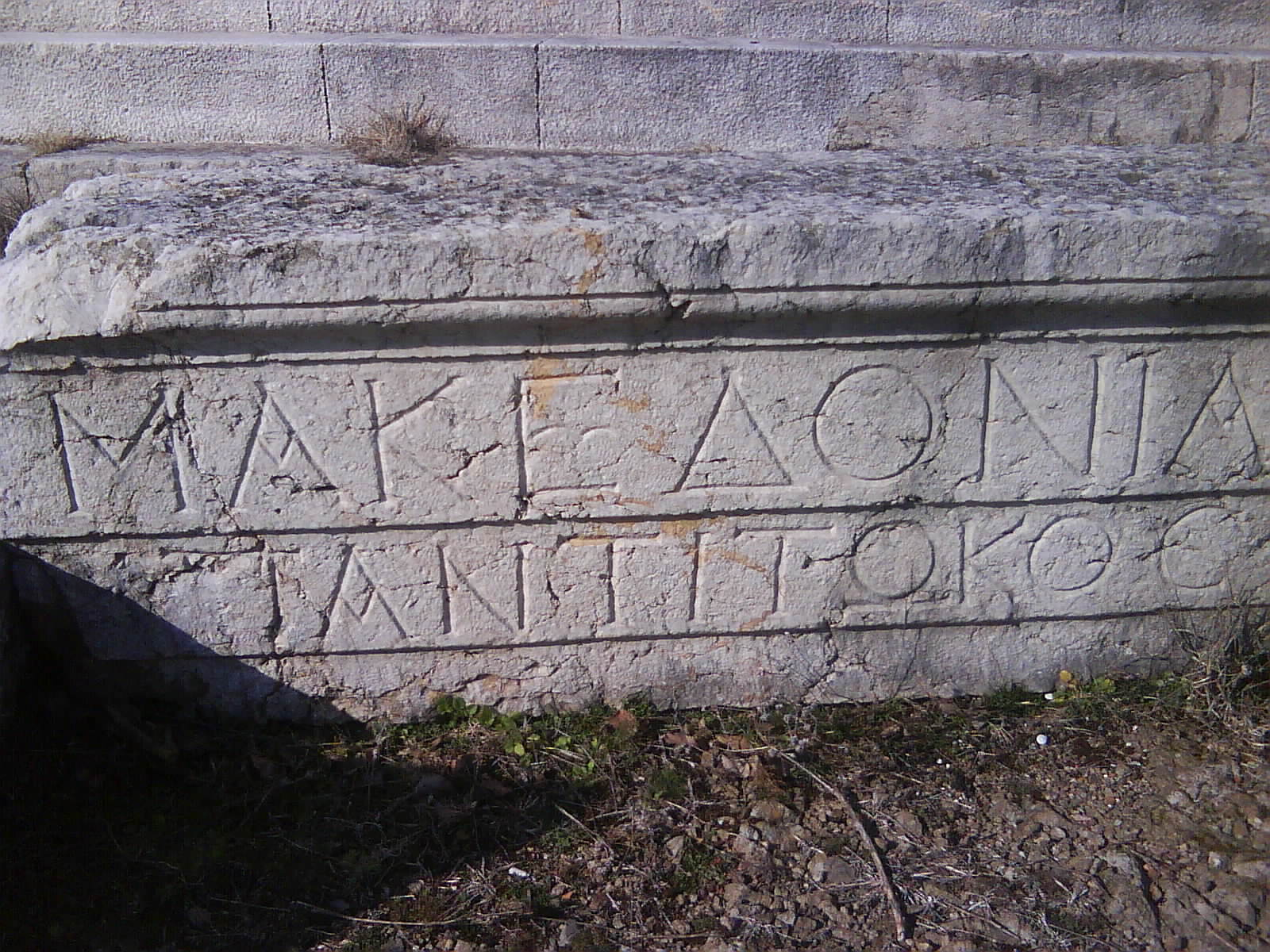 Isar, Marvinci